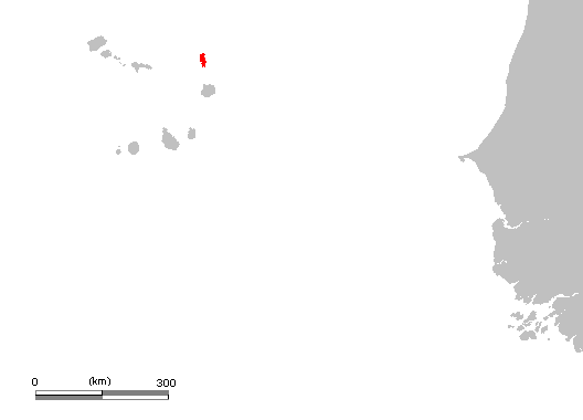 CV Santa Maria.PNG (Cape Verde)